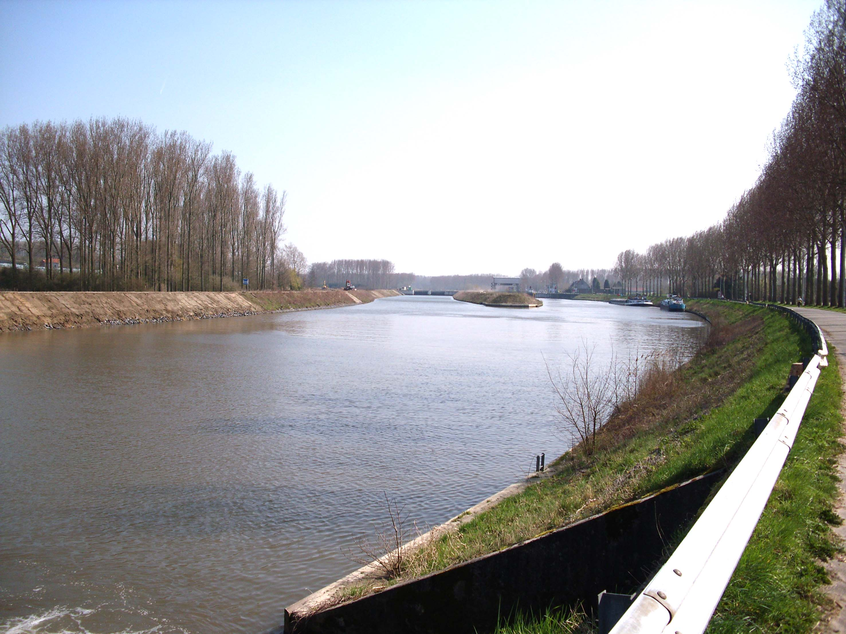 Sas van Asper op de Schelde - Gavere - Oost-Vlaanderen - Vlaanderen - België. Rechts de oude vaargeul naar de oude Sassen, links de nieuwe vaargeul. Toestand op 1 april 2009.